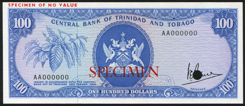 Trinidad and Tobago 100 Trinidad Dollars banknote of 1964